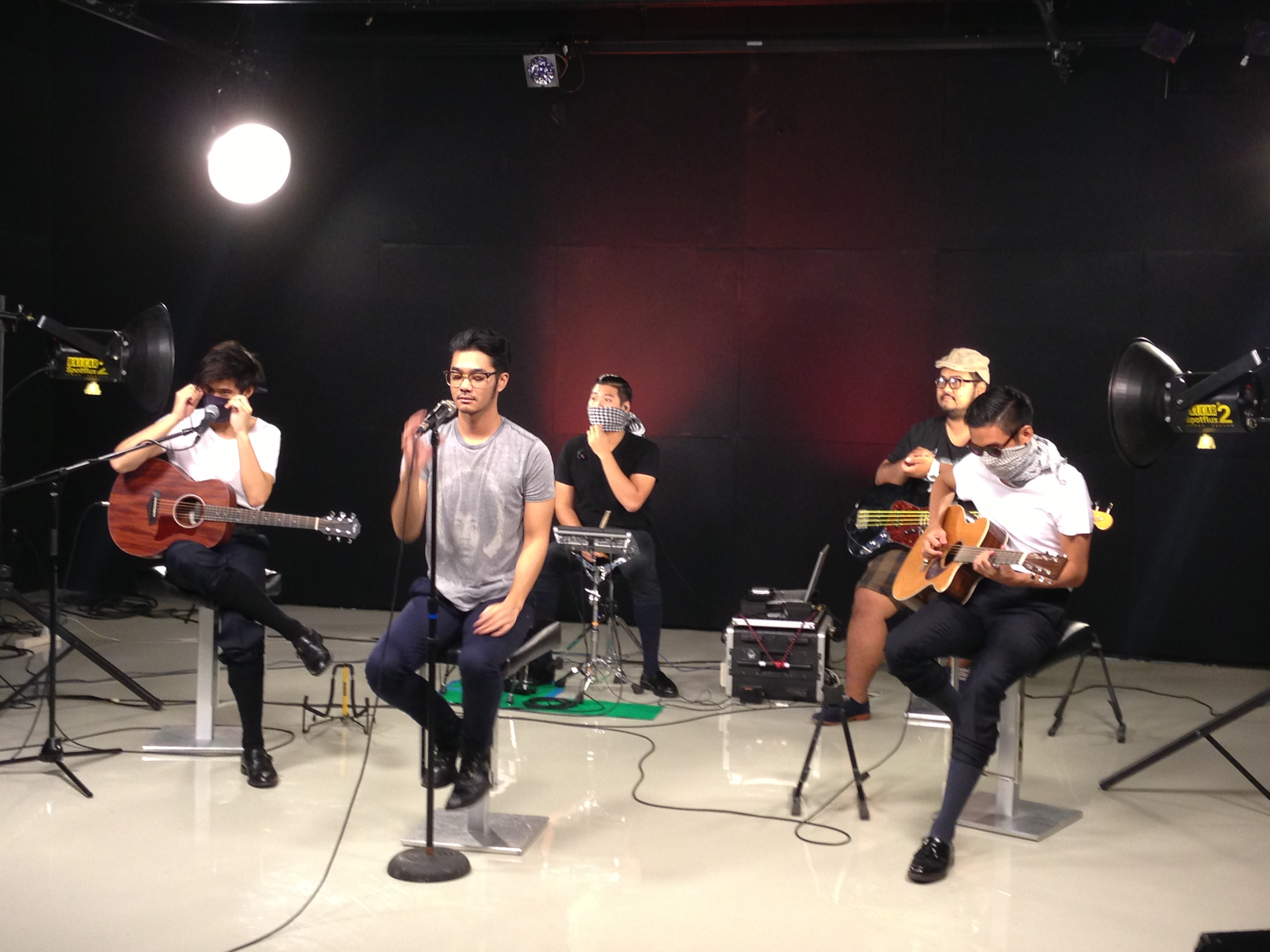 Getsunova performing at VERY TV.